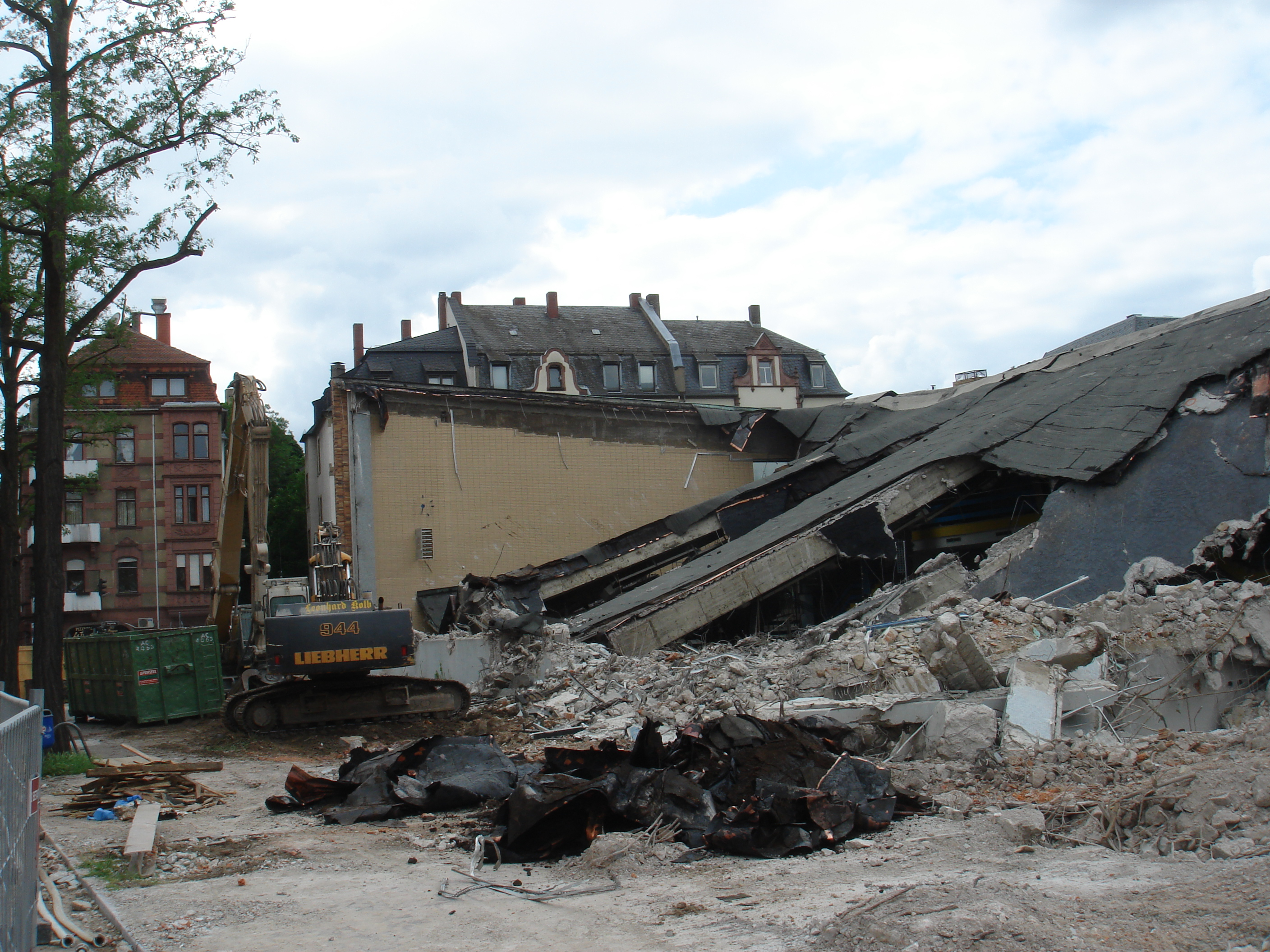 Stürzenden Linien am Gebäude, abgerissenes Stadtbad Frankfurt Sachsenhausen, Textorstraße